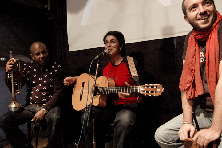 Amparanoia, setembre de 2008.